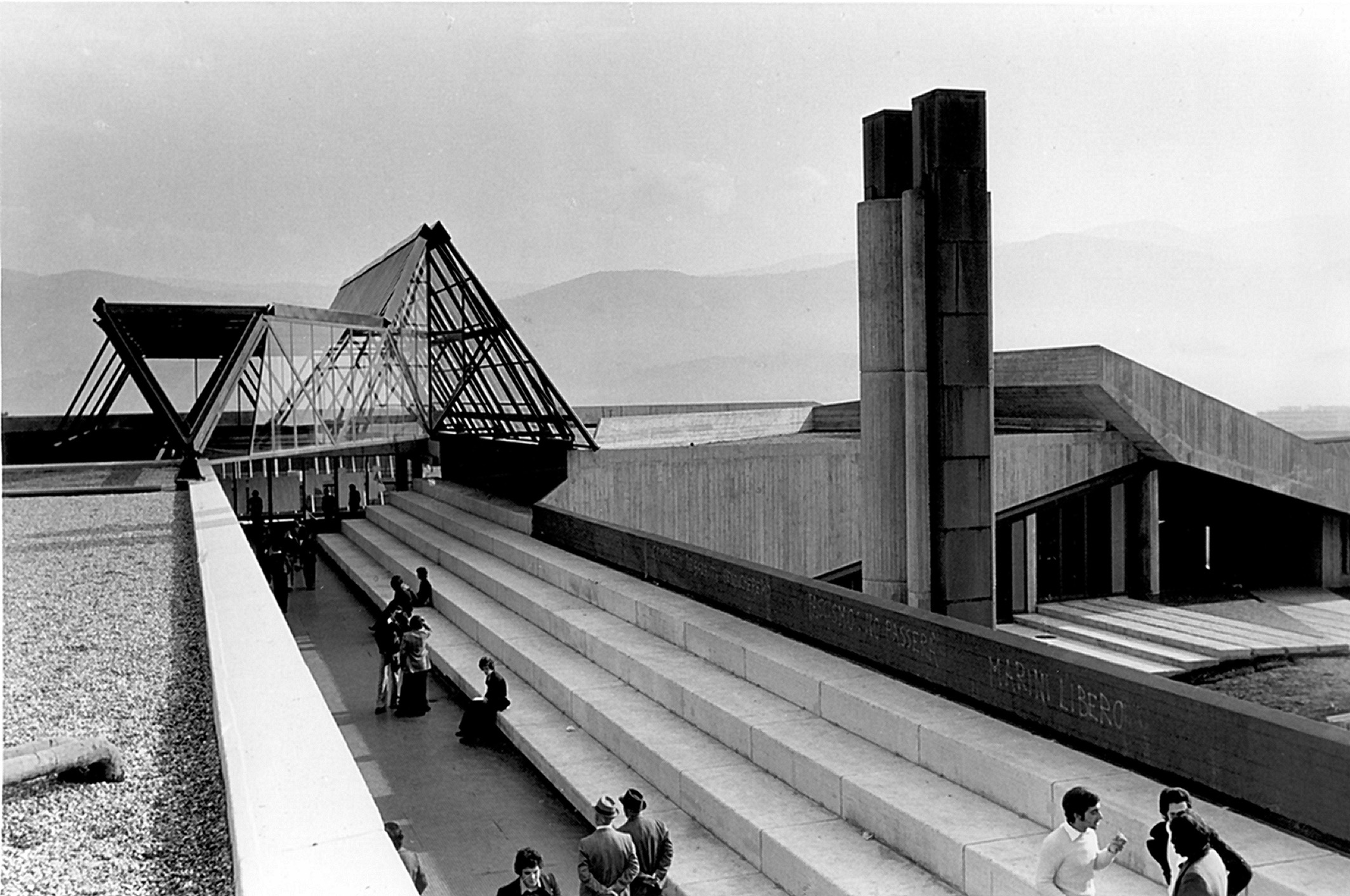 Parte del polifunzionale dell'università di Arcavacata a Rende progettato da Pica Ciamarra e realizzato a più riprese negli anni Settanta